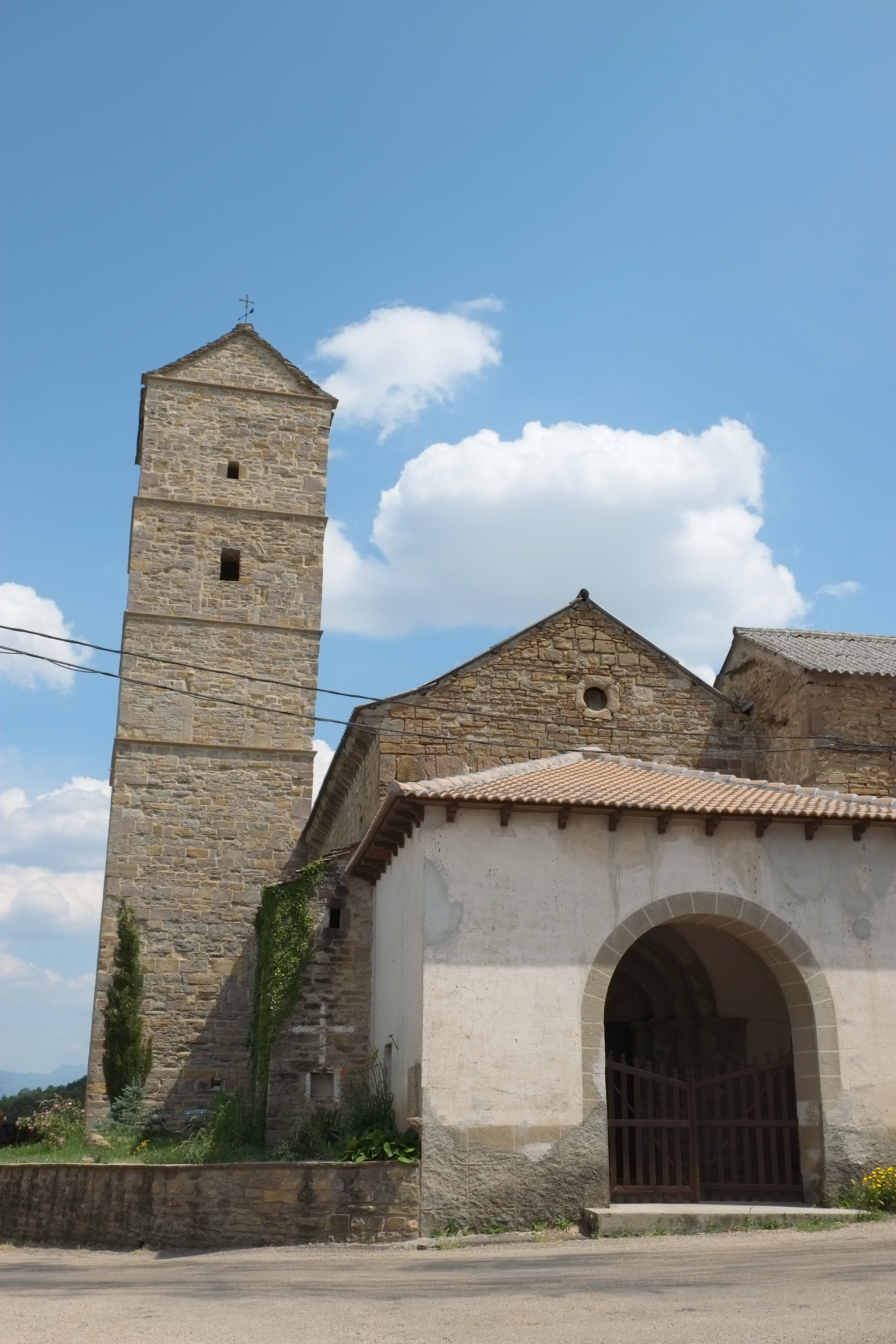 Kirche Nuestra Señora de la Asunción in Navasa in der Provinz Huesca in Aragonien (Spanien)